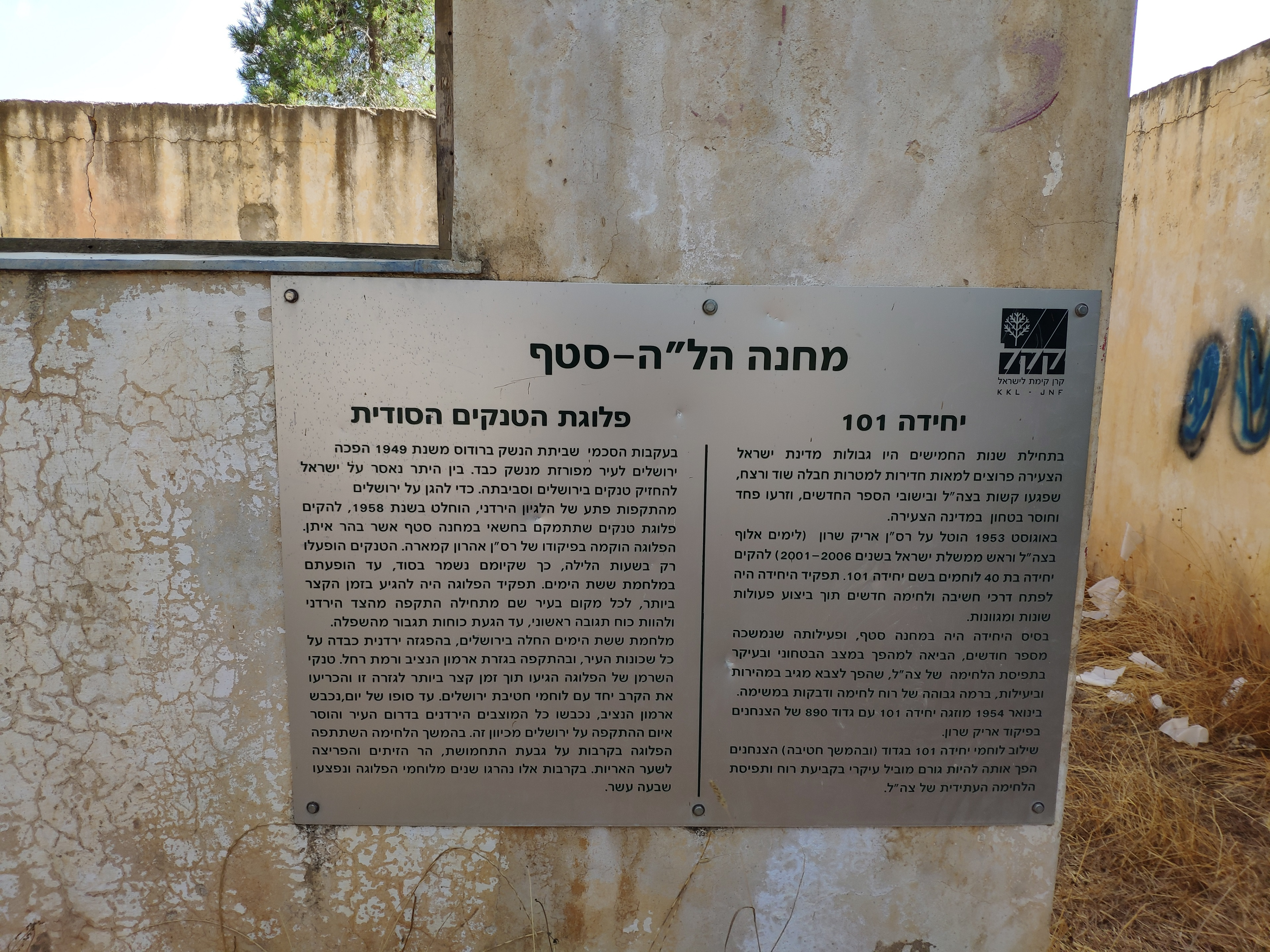 לוחית זכרון לפלוגת הטנקים הסודית ויחידה 101 בסטף